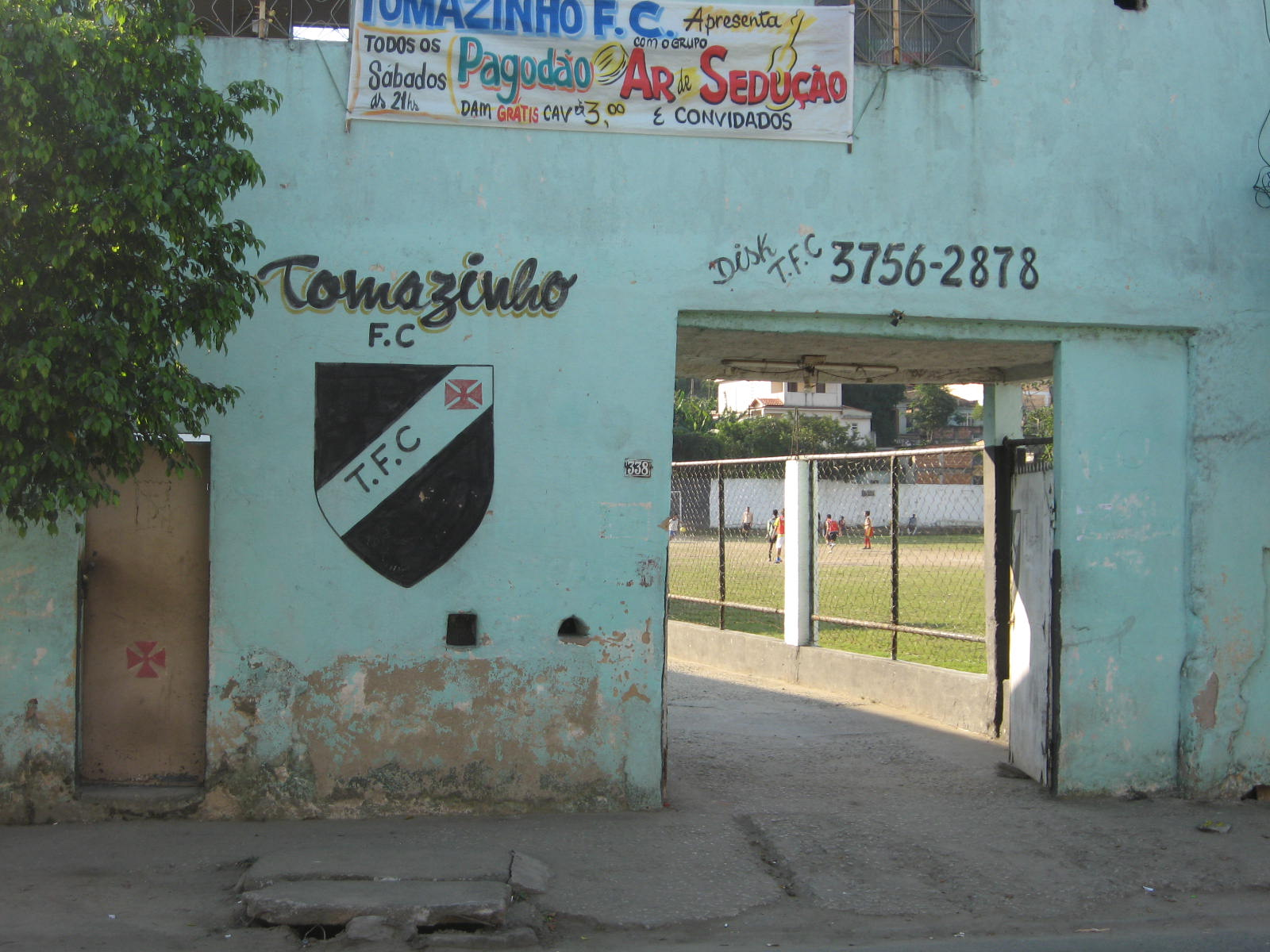 Entrada do Tomazinho Futebol Clube, equipe profissional de futebol de São João de Meriti, RJ